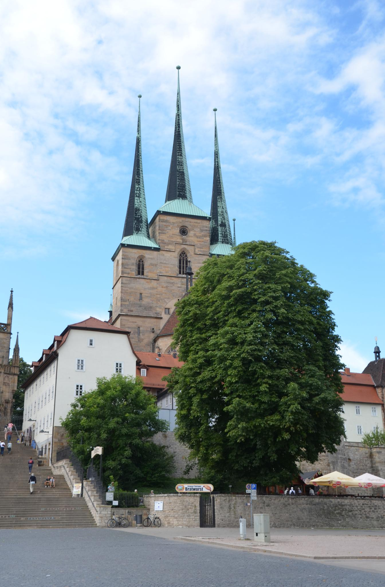 Erfurt Impressionen